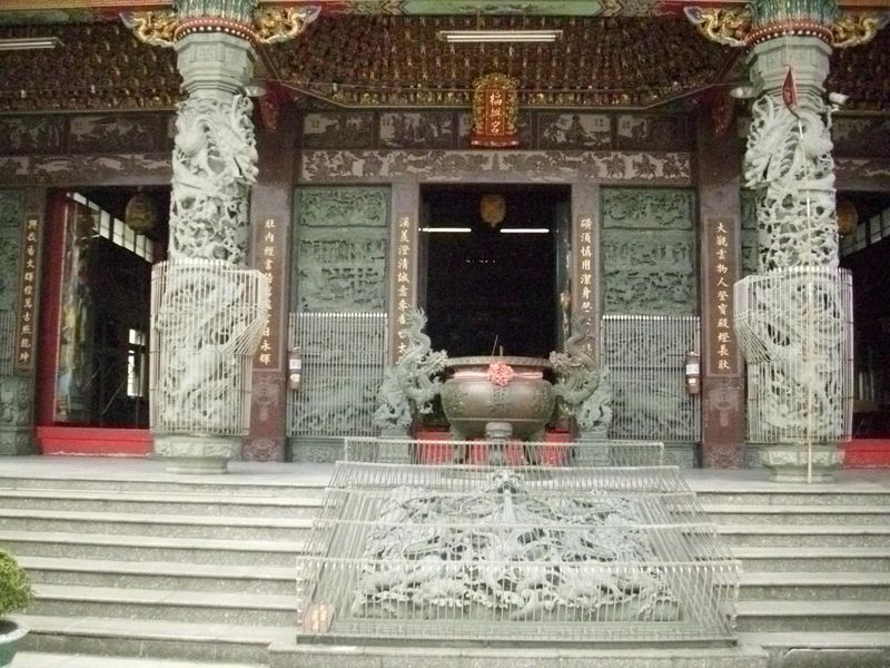 Fŭing Temple, Dadu District, Taichung.中文（台灣）: 位在台中市大肚區磺溪里大肚福興宮。